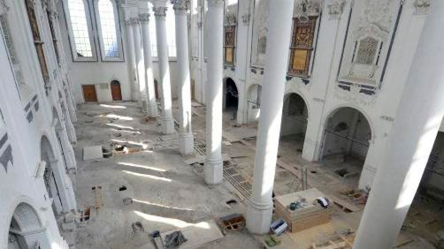 Dominikanerkirche Augsburg während der Sanierung